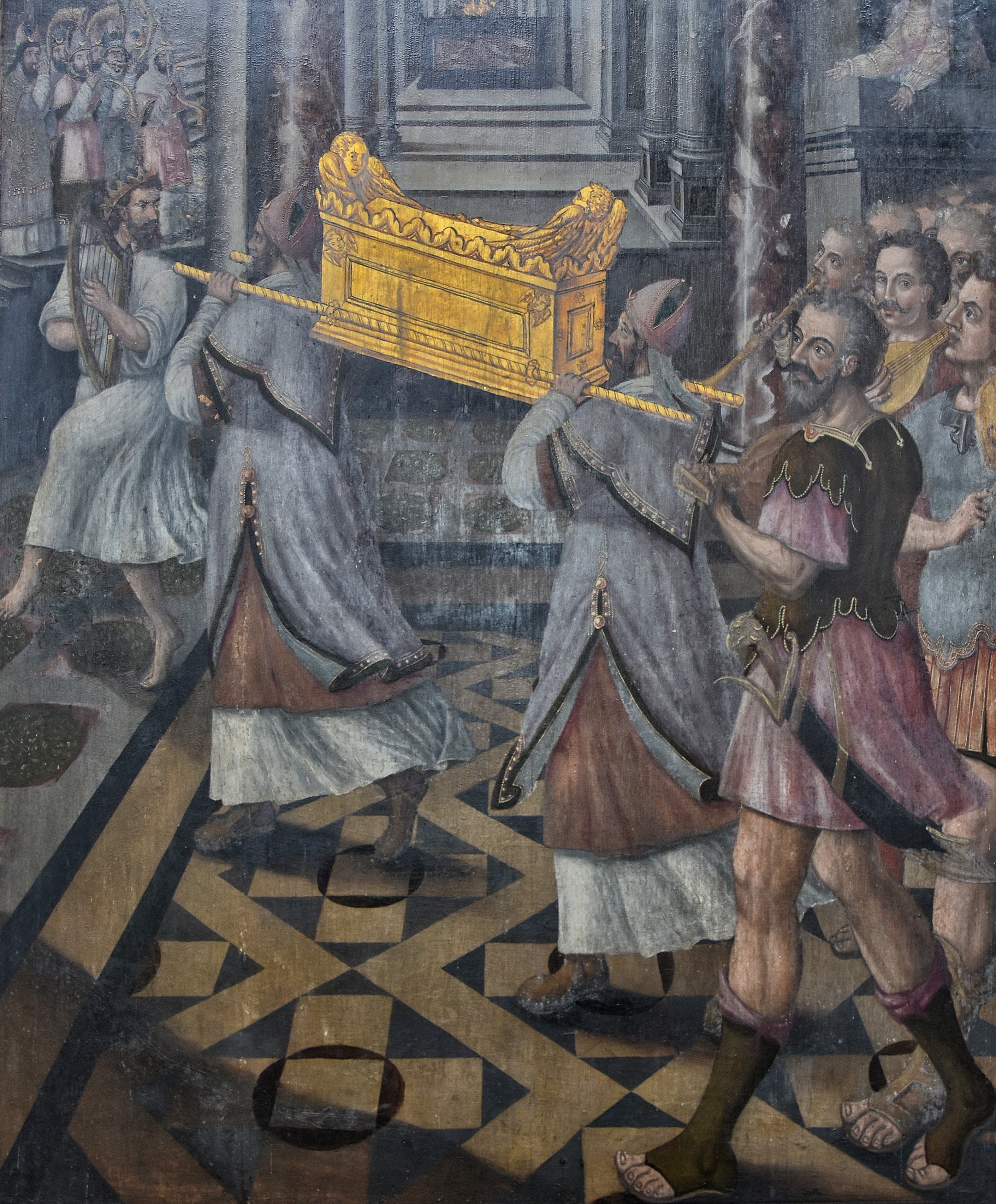 Lucas II Horenbout (c.1560-1626) De fontein des levens OLV Ter Hoyekerk Gent 22-06-2019 14-24-13 This photo of movable heritage has been taken in the Flemish Region